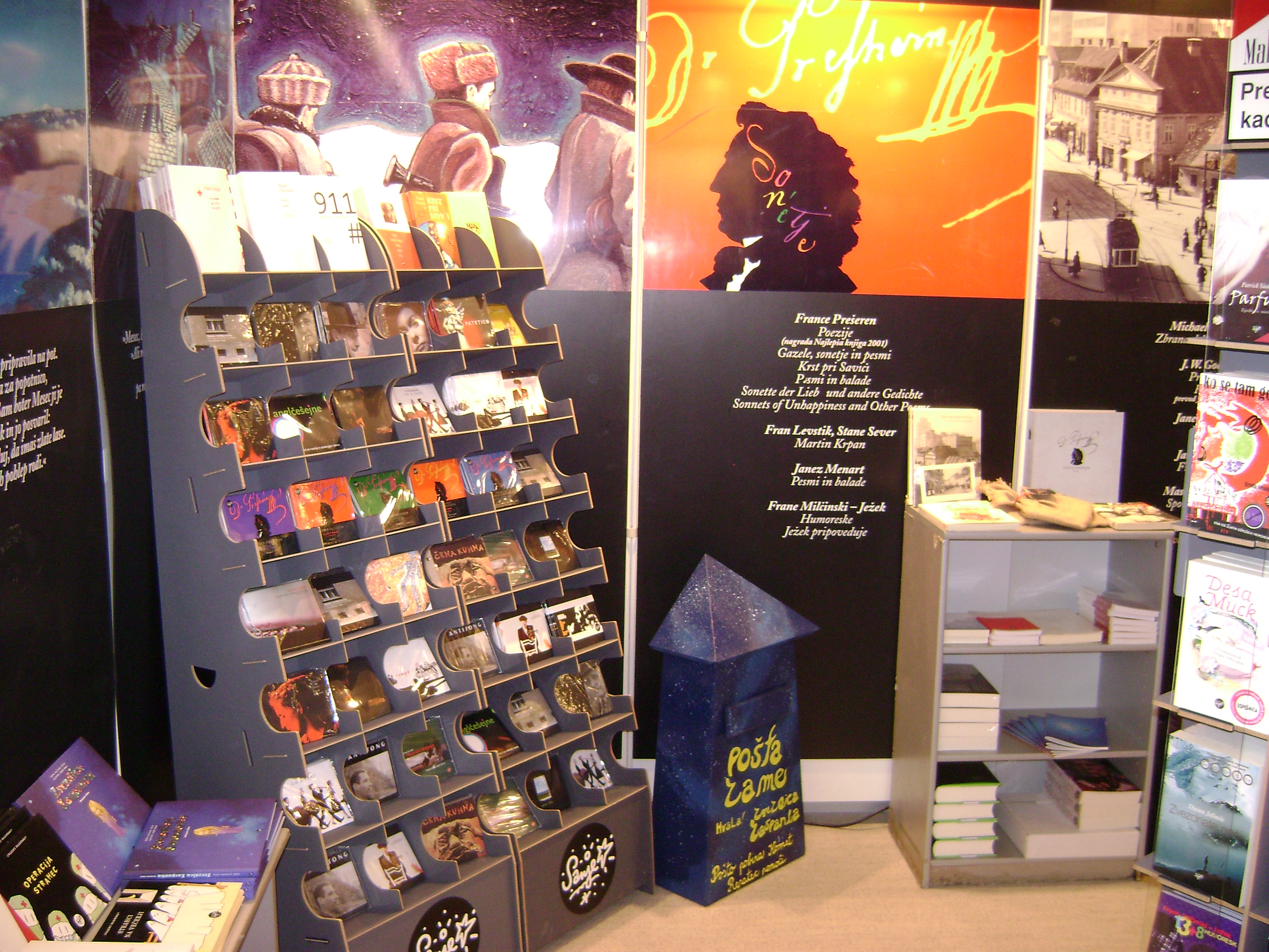 Knjižni sejem 2008 v Cankarjevem domu - stojnica Založbe Sanje. Foto: Založba Sanje.